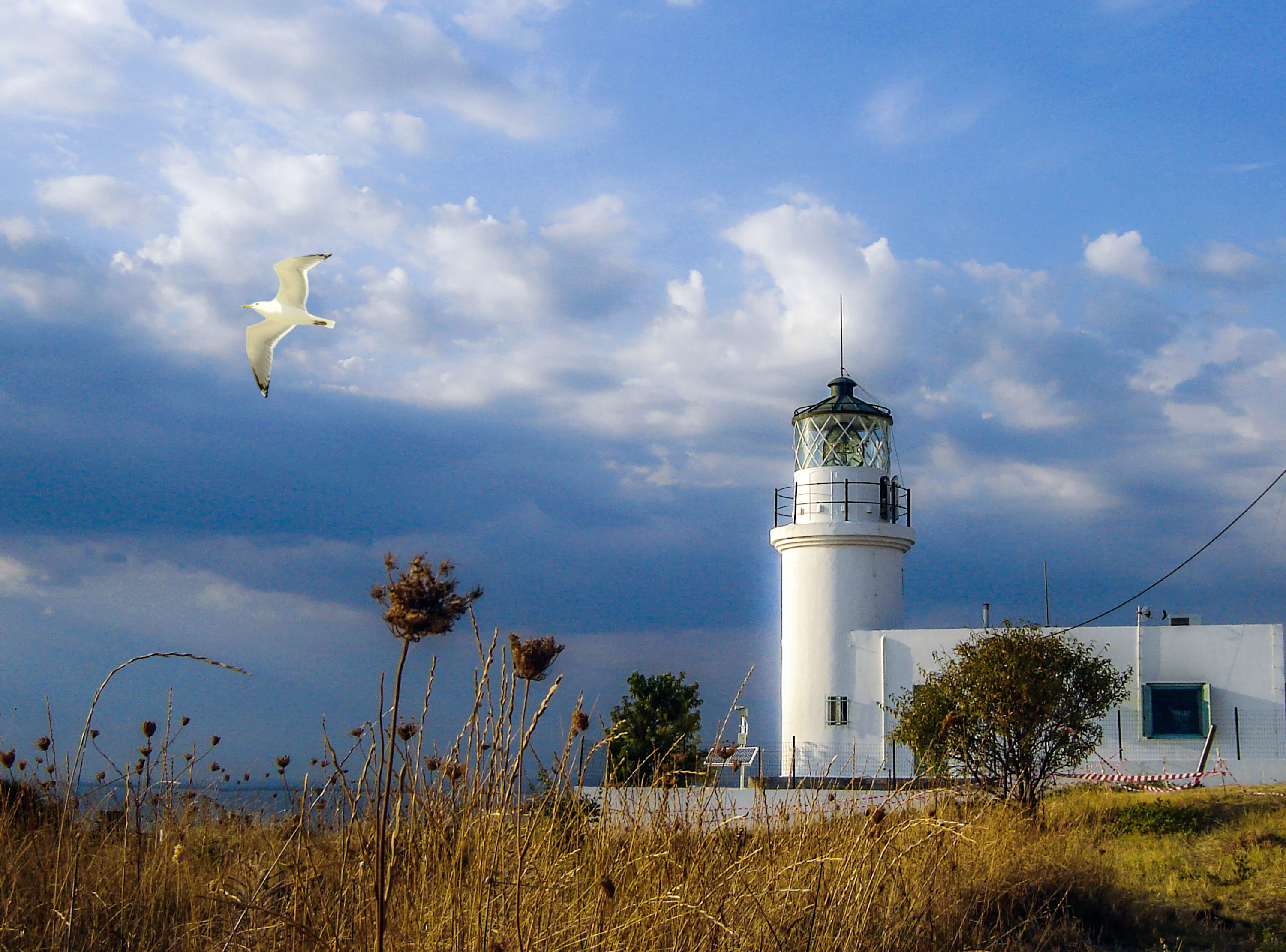 Ο υδροβιότοπος, η χλωρίδα και η πανίδα της περιοχής. This is a photography of Natura 2000 protected area with ID Αγγελοχωρίου Λιμνοθάλασσα Αγγελοχωρίου